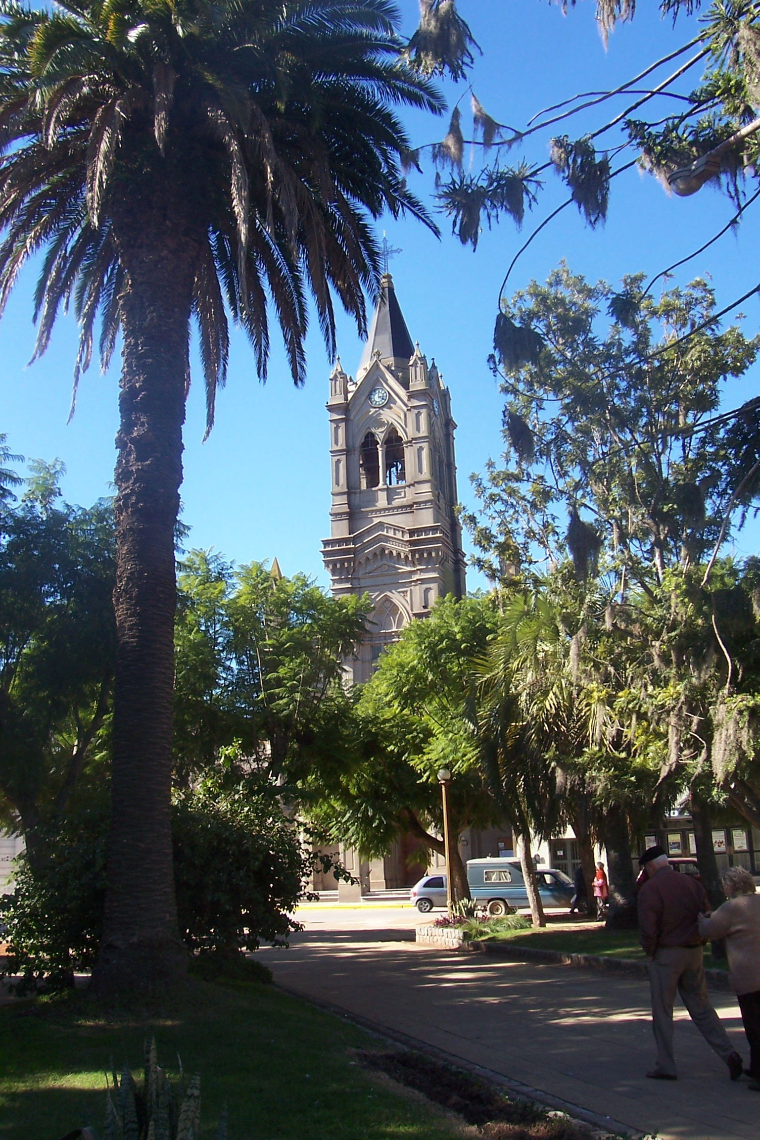 Iglesia católica en el centro de la ciudad de Baradero (Argentina).